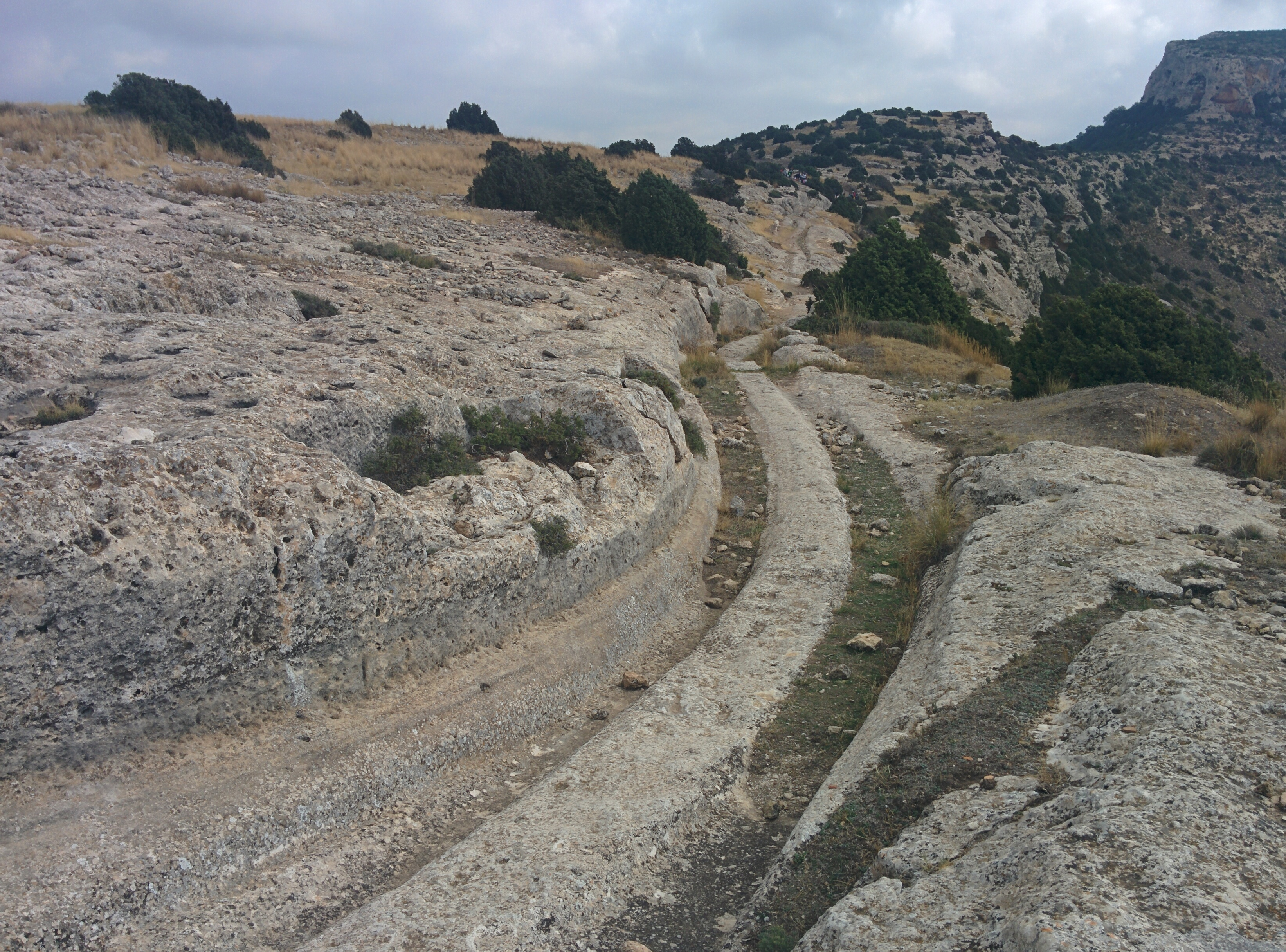 Poblado ibérico Castellar de Meca (Ayora, Valencia).